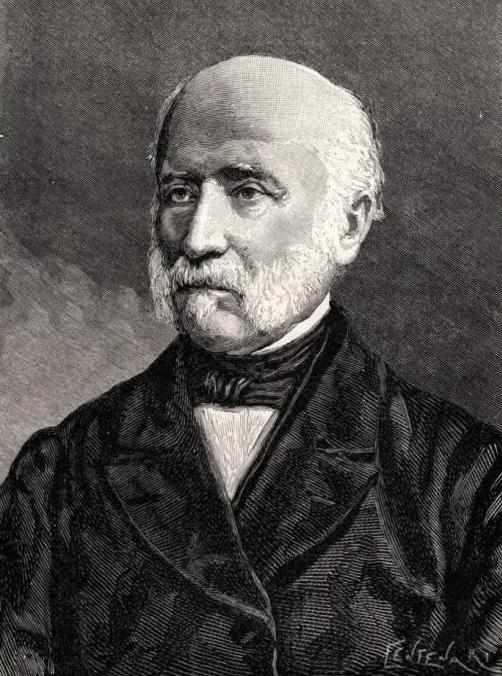 Il generale Giuseppe Avezzana Immagine tratta da Jessie W. Mario, "Garibaldi e il suo tempo", F.lli Treves Editori, Milano, 1892